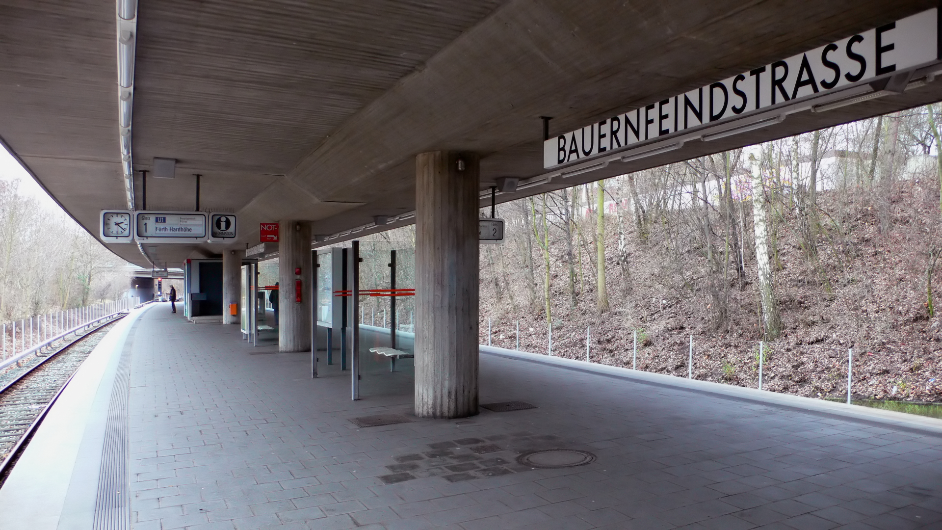 U-Bahnhof Bauernfeindstraße der U-Bahn Nürnberg, Bahnsteigebene, Blick von Nordwesten